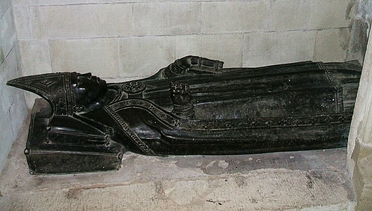 Sepulcro del prelado Diego de Álava y Esquível († 1562), que llegó a ser obispo de Córdoba, Ávila y Astorga, en la iglesia de San Pedro Apostol de Vitoria-Gasteiz.